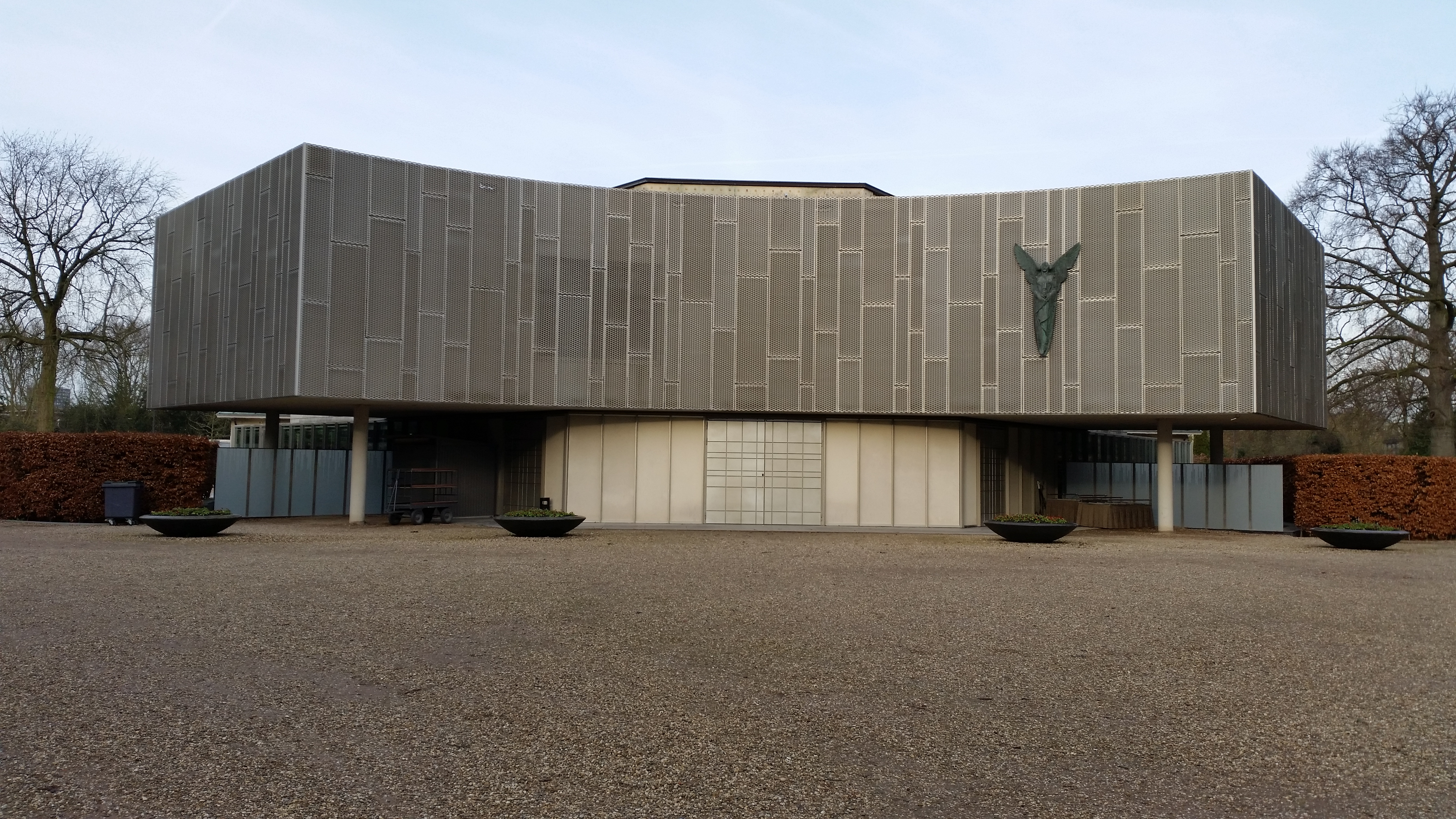 Januari 2020 rondom de aula van De Nieuwe Ooster-Amsterdam-oost, met op de achtergevel het beeld Engel des doods van Fred Carasso